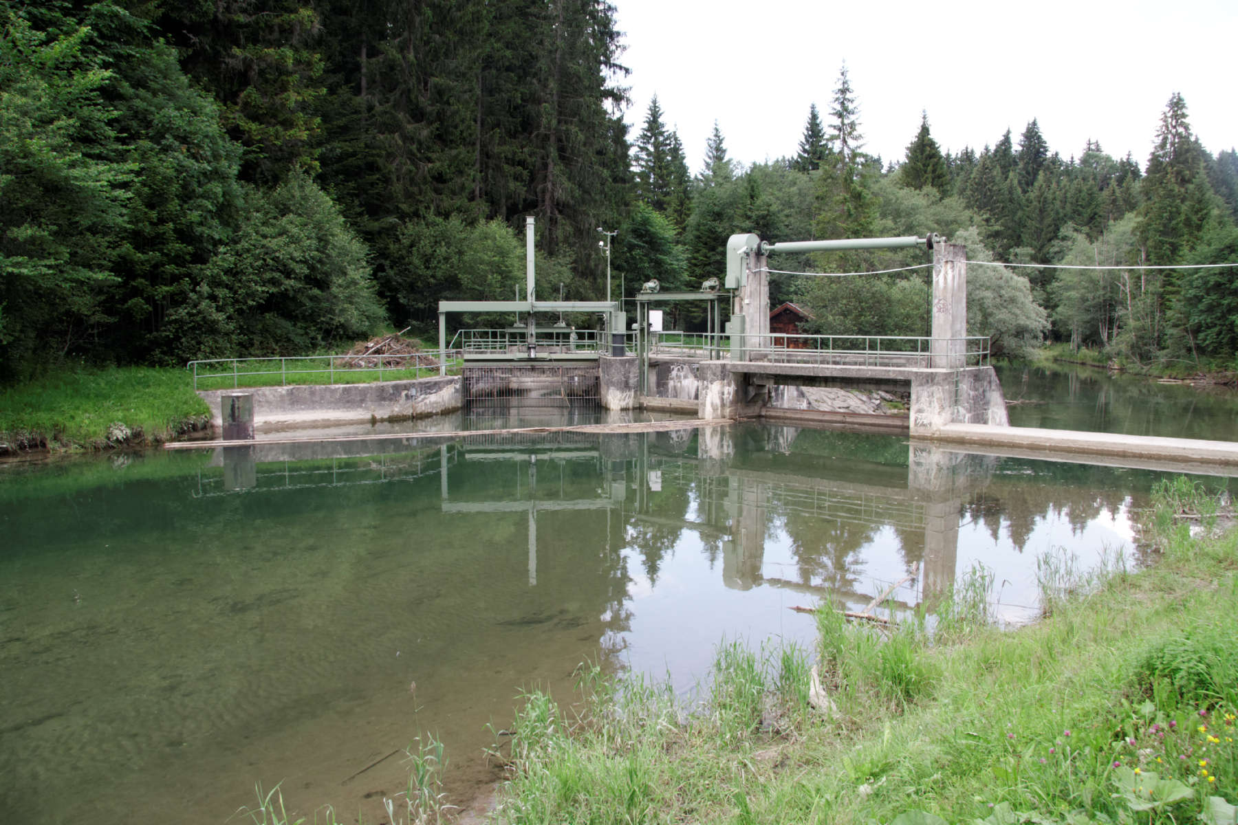 Stauwehr der Ammer bei Altenau zum Ableiten des Kanals für das Wasserkraftwerk Kammerl